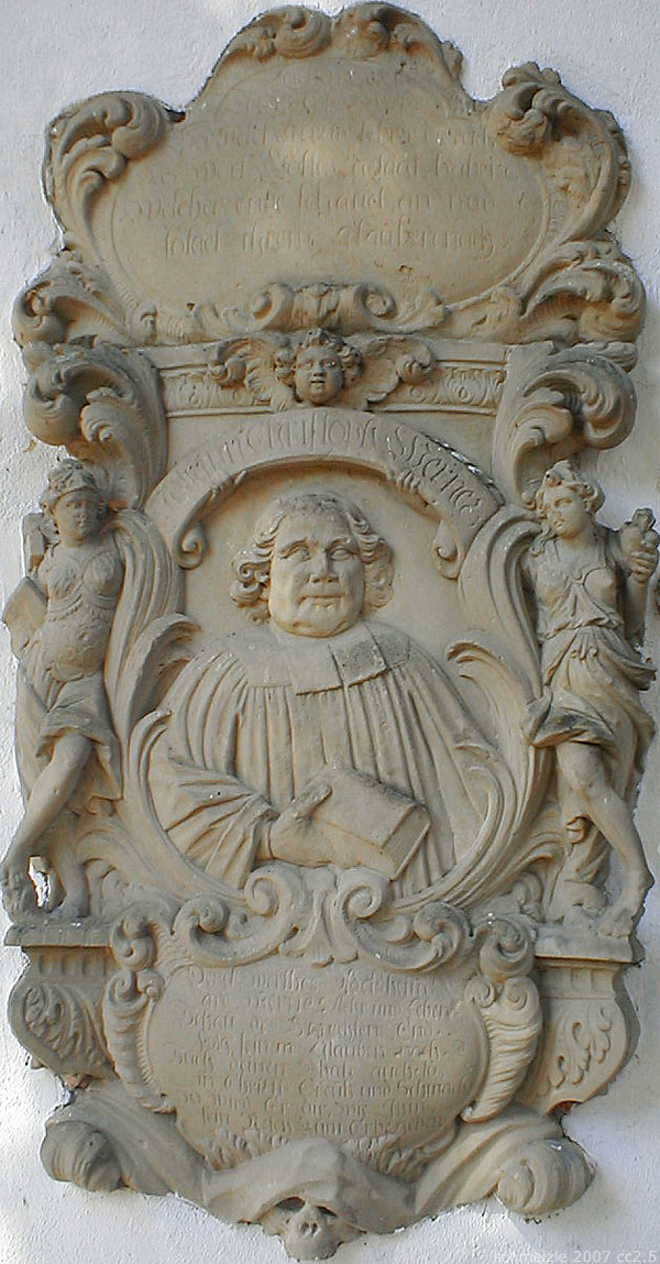 Epitaph an der Jakobskirche in Adelsheim: Pfarrer Joh. Christoph Werner, links und rechts die allegorischen Figuren Glaube und Liebe.